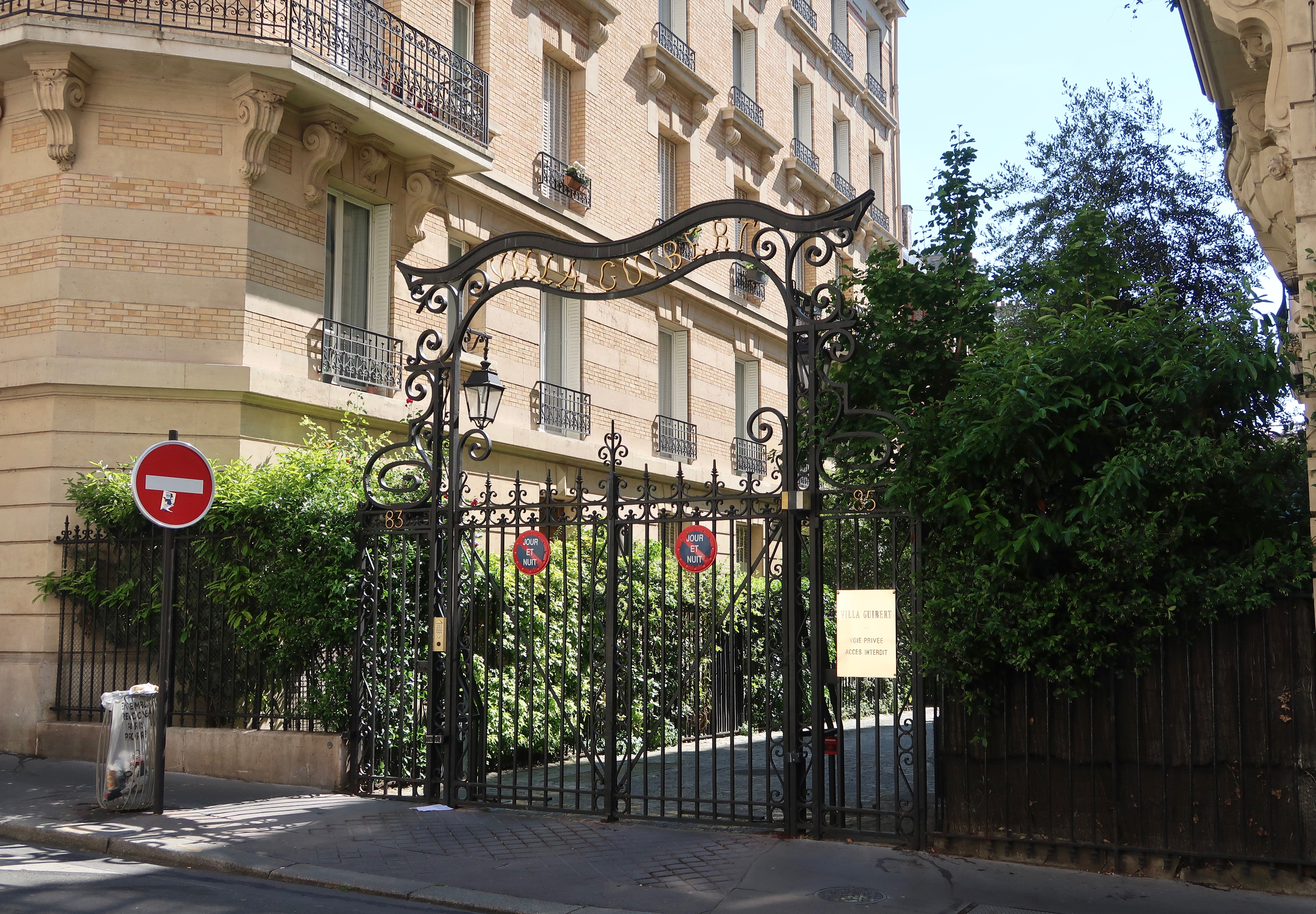 Villa Guibert (Paris, 16e).